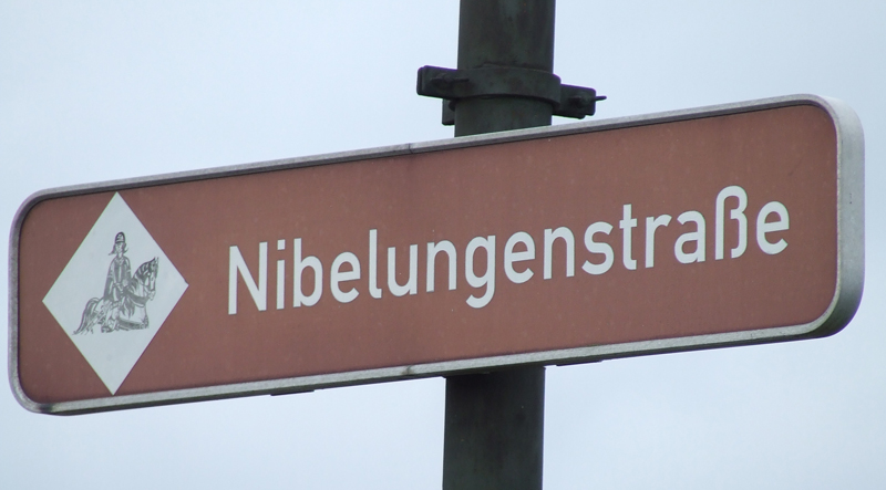 Touristisches Hinweisschild auf die Nibelungenstraße hier in Worms an der Bundesstraße 47